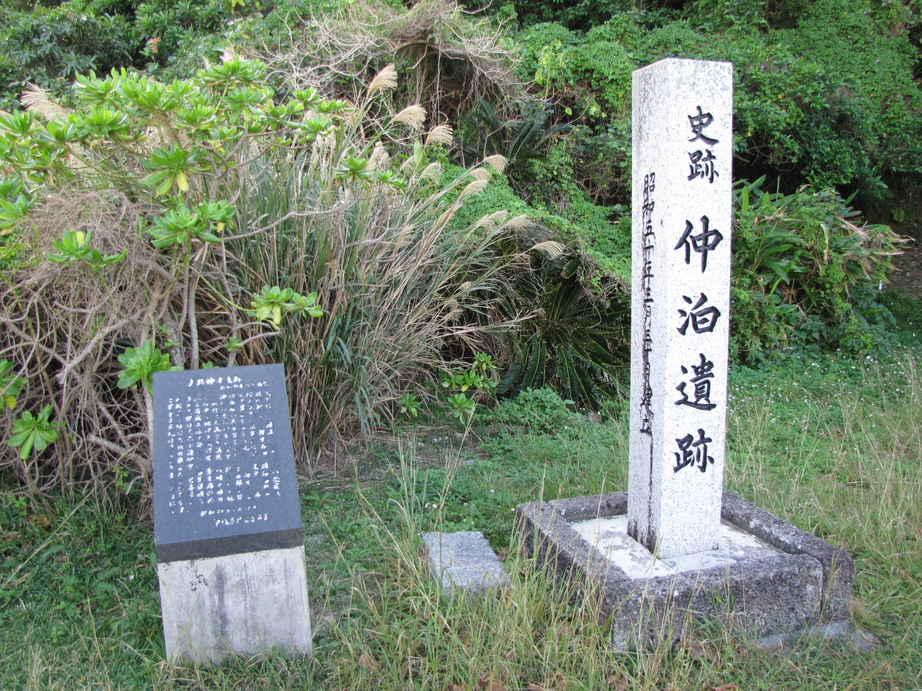 沖縄県国頭郡恩納村にある仲泊遺跡入口付近。